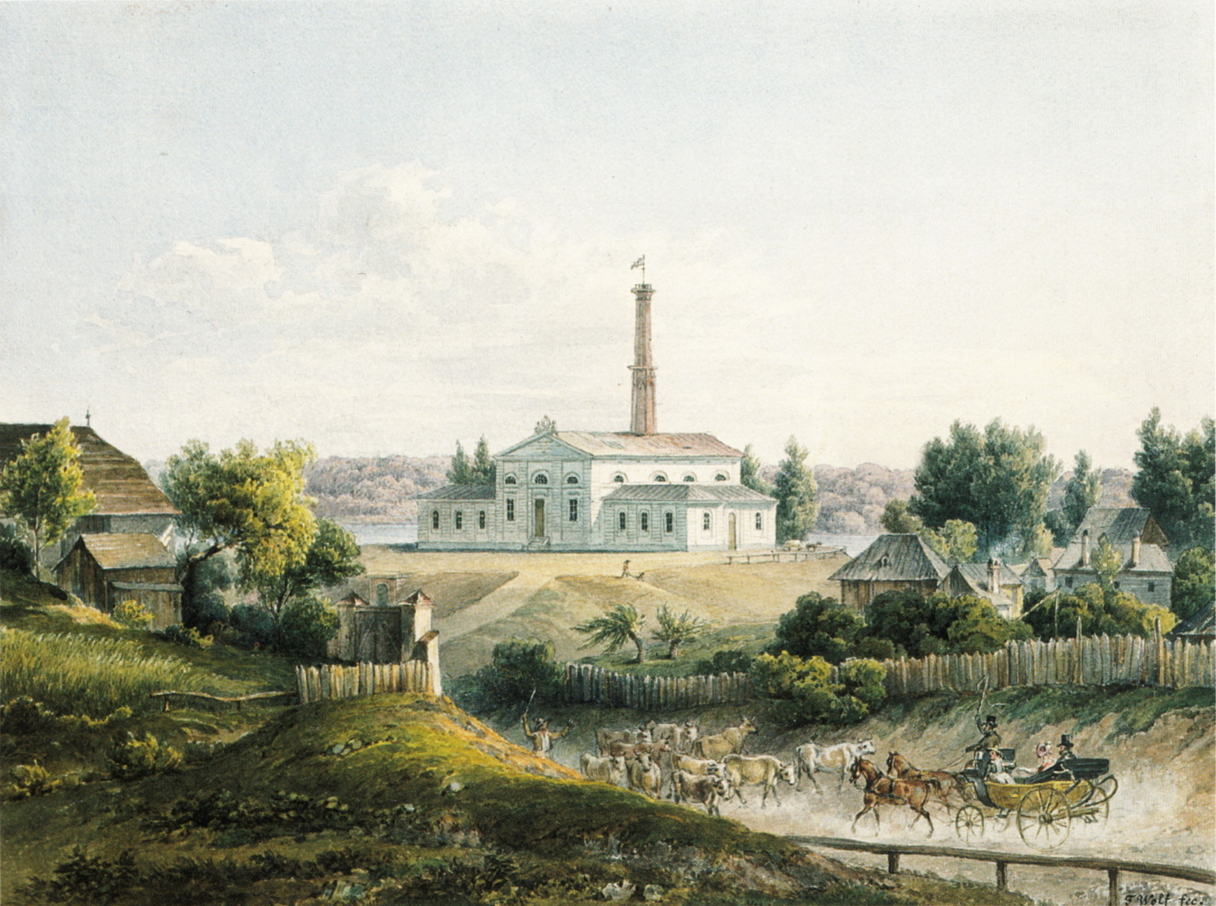 Das Maschinenhaus der Kaiser-Ferdinands-Wasserleitung. Aquarell und Deckfarbe, 25,5 x 34 cm. Signiert